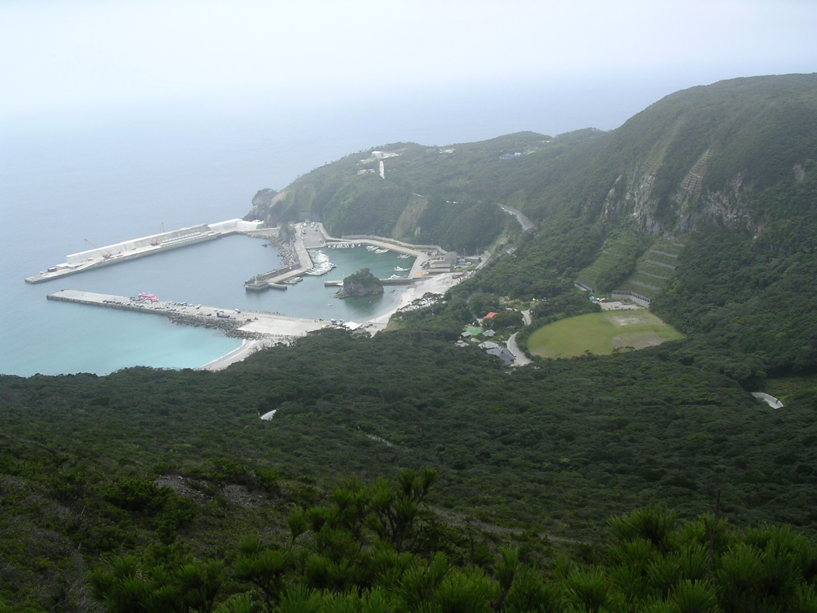 Tako bay, Kōzushima, Izu Islands, Japan